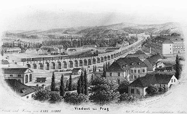 Negrelliho viadukt v Karlíně. Lept Josefa Rybičky podle předlohy Karla Brantla z roku 1854. Muzeum hlavního města Prahy.